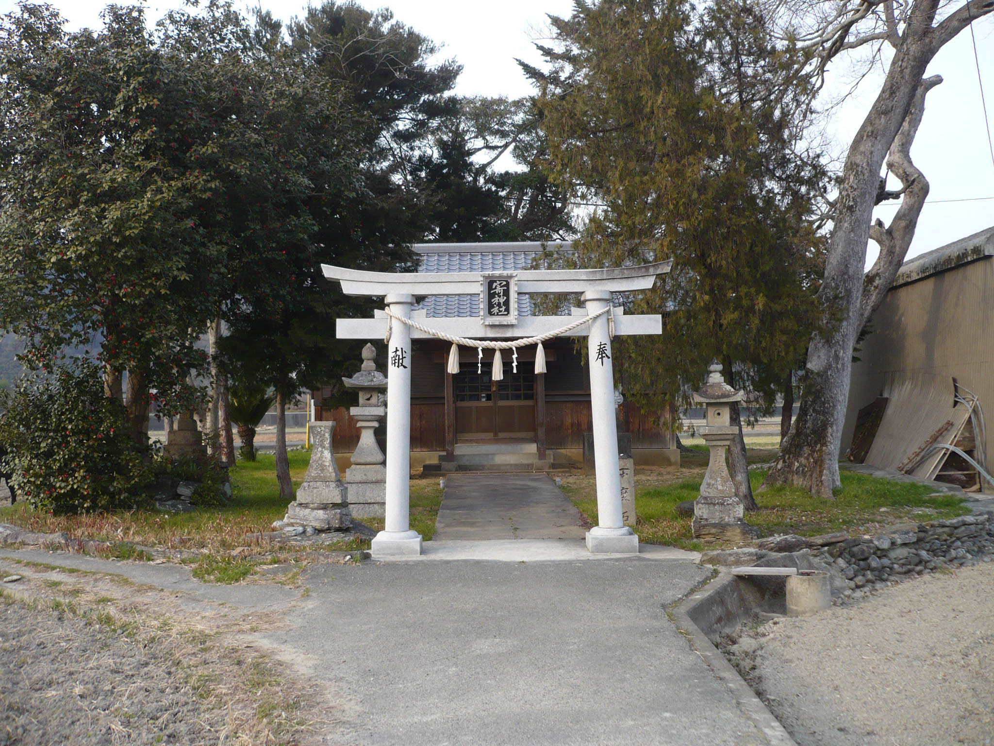 寄神社の鳥居